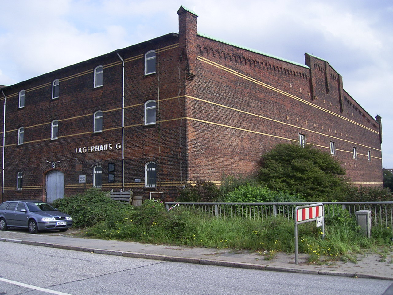 Lagerhaus G am Dessauer Ufer in Kleiner Grasbrook, 1944/45 als Außenlager des Neuengamme genutzt.This is a photograph of an architectural monument.